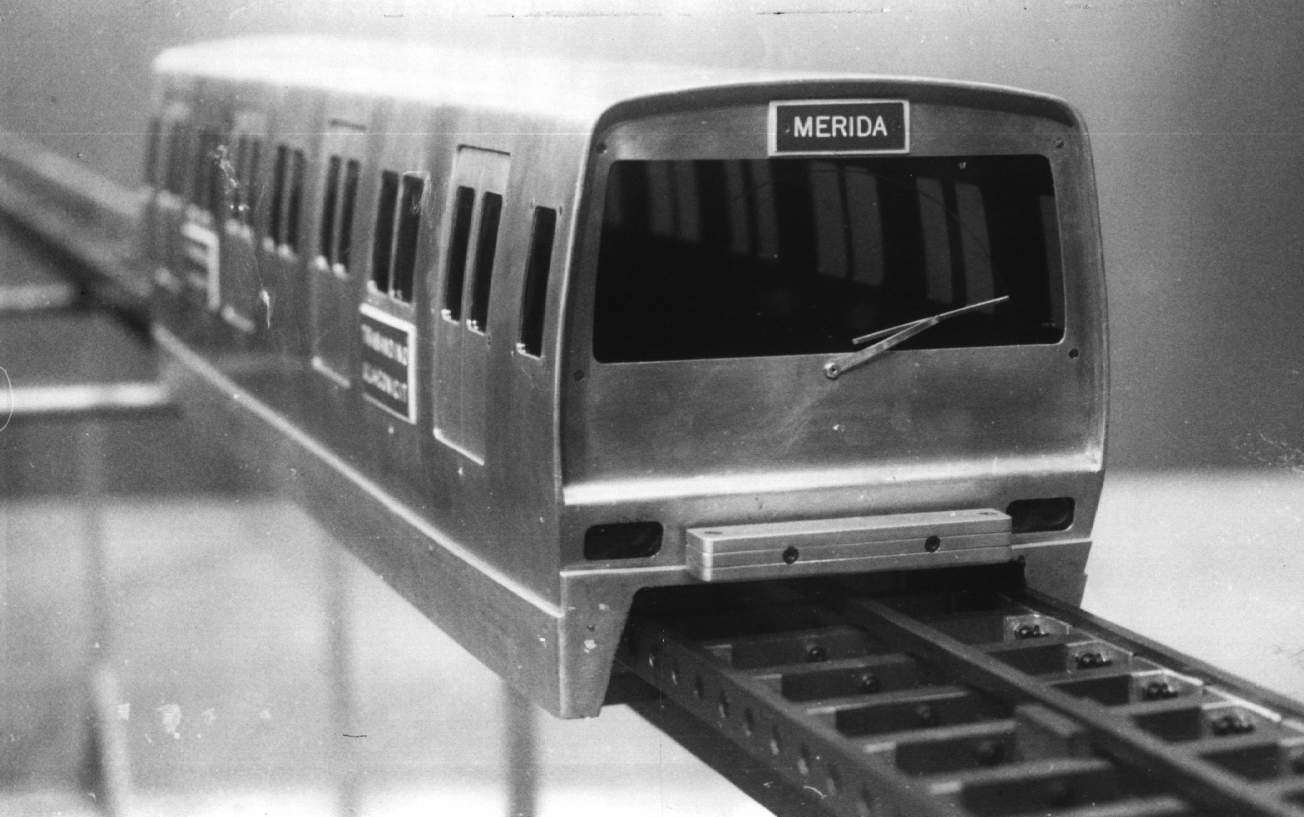 Prototipo 4 del TELMAGV